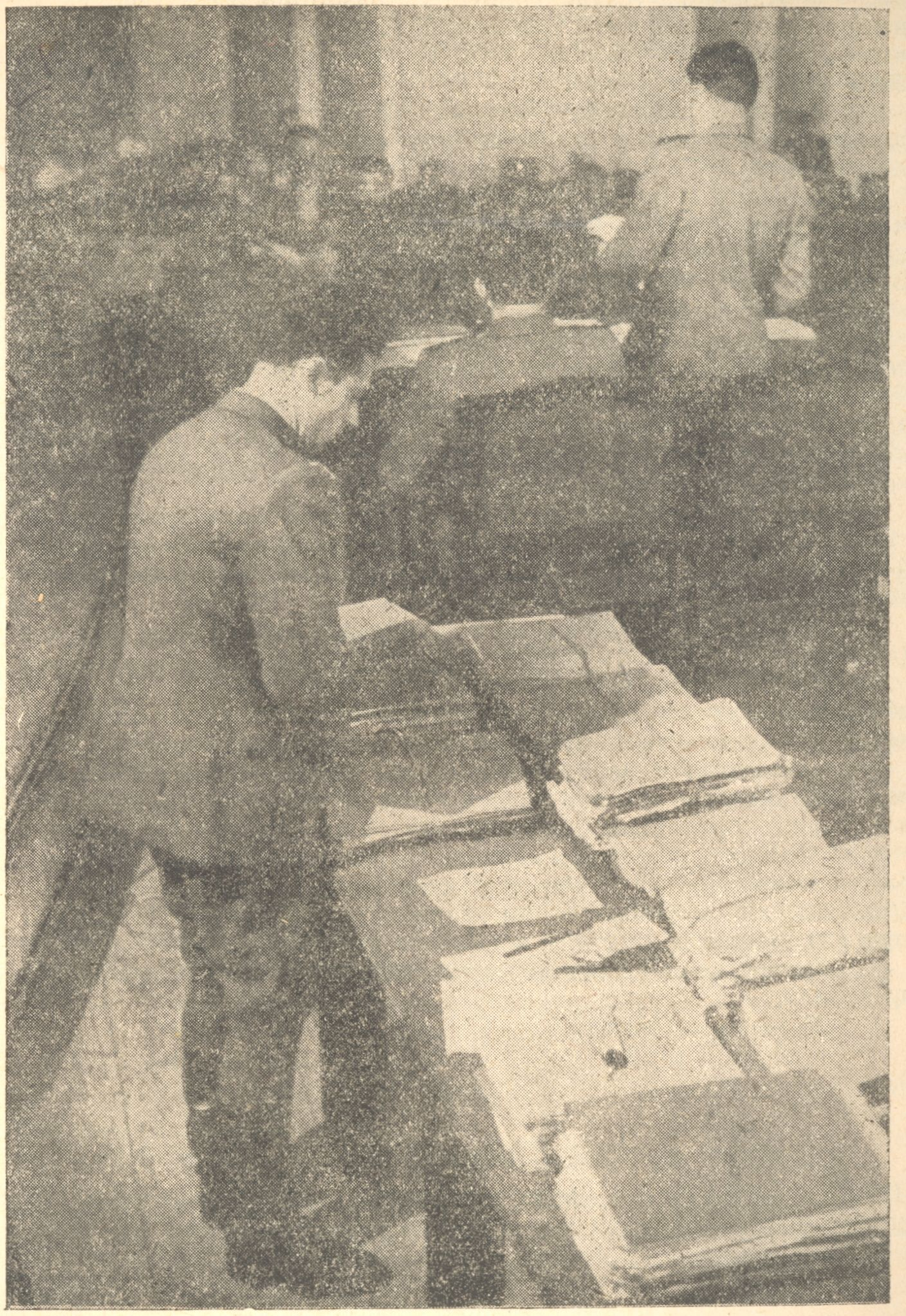 Srpskohrvatski / српскохрватски: Zaplenjena Mihailovićeva arhiva, kao glavni dokazni materijal na beogradskom procesu 1946. godine. Zastupnik vojnog tužioca, pukovnik Miloš Minić, za vreme suđenja čita dokumente iz zaplonjene arhive Draže Mihailovića, kojima se utvrđuje Mihailovićeva izdaja. Major Borivoje Nešković na sudu je rukovao dokumentima, kojih je uz optužnicu bilo priloženo preko hiljadu.